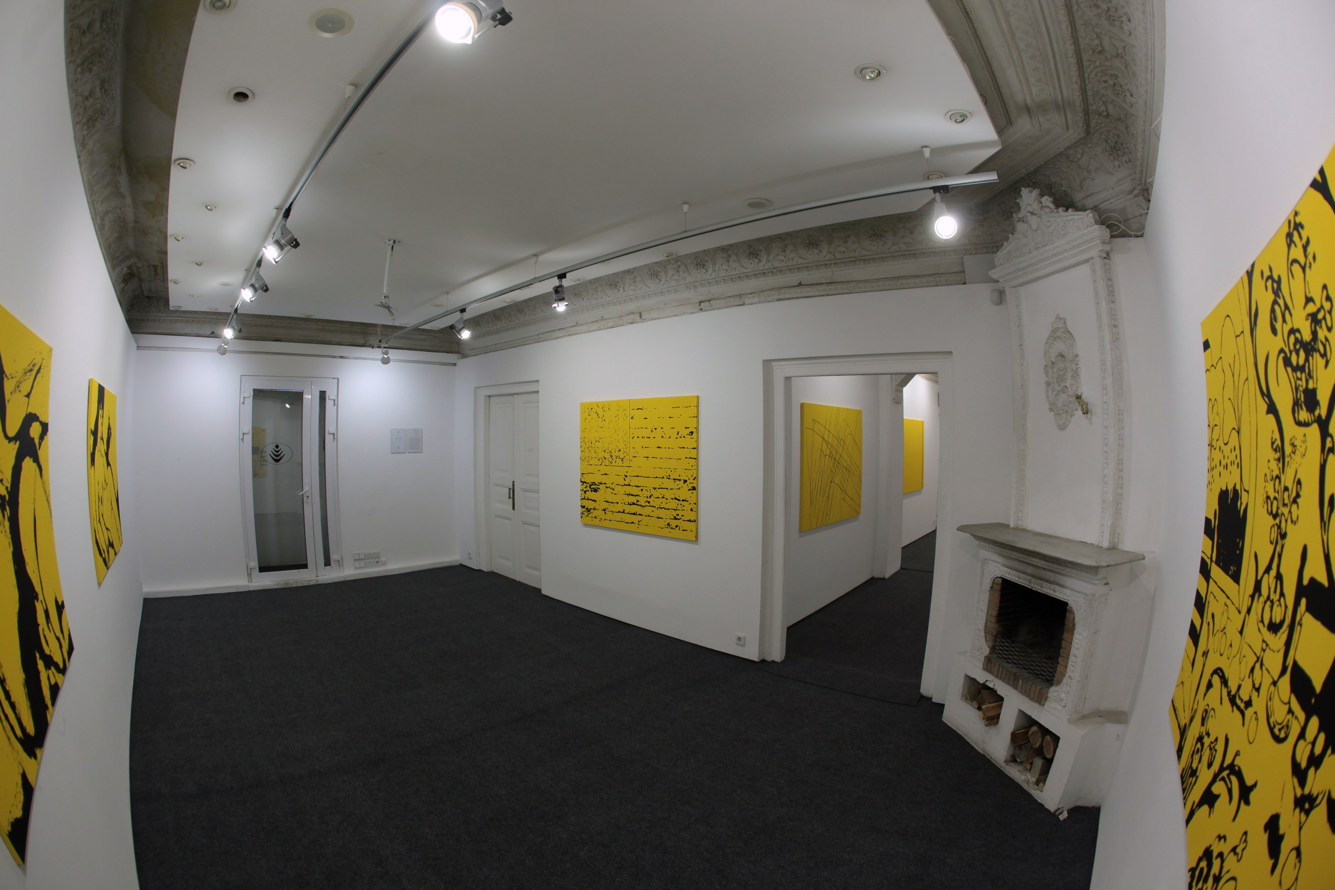 Роберт Саллер "Жовта серія", 2015